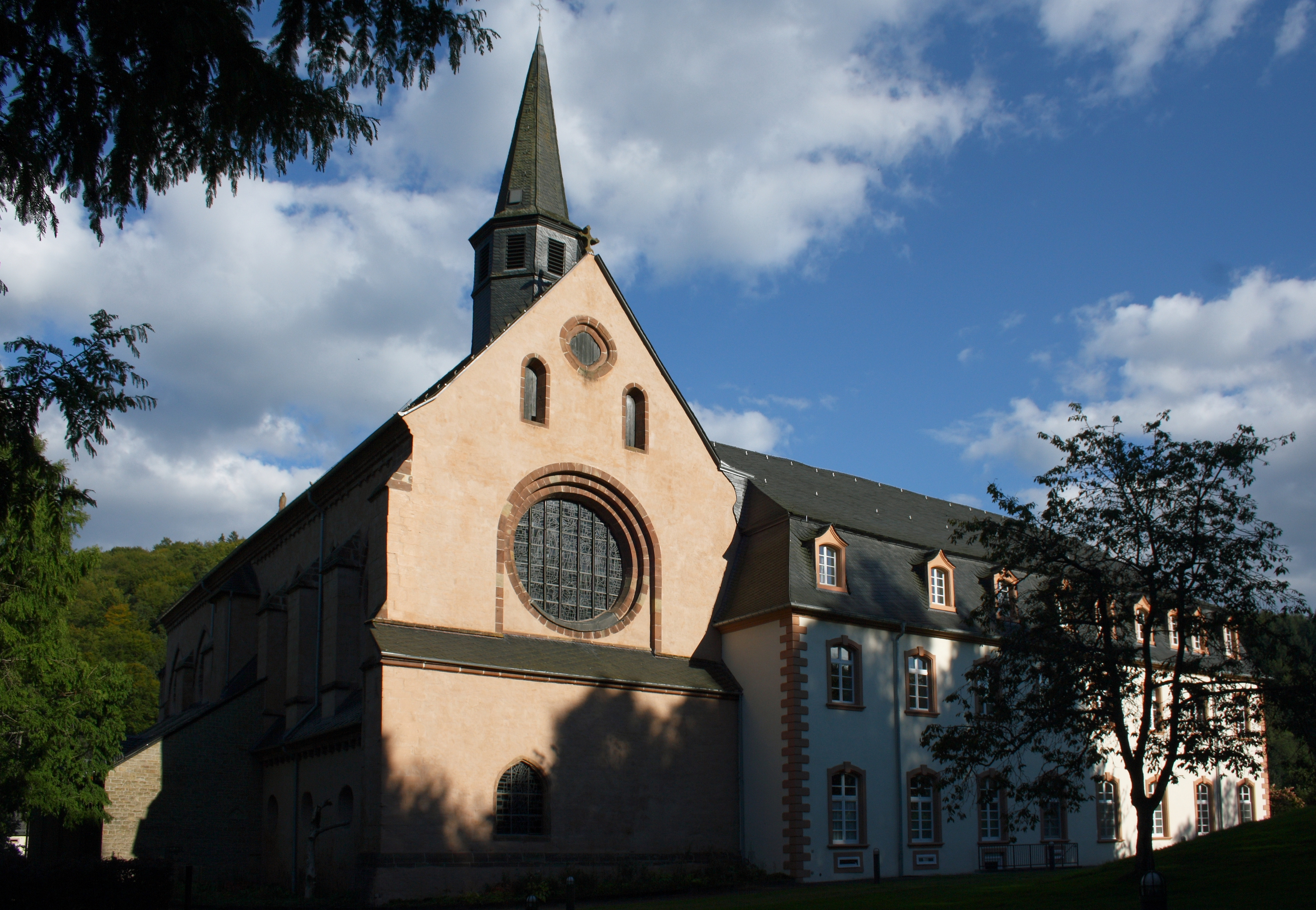 Ehemaliges Zisterzienserinnenkloster Sankt Thomas an der Kyll in Sankt Thomas im Eifelkreis Bitburg-Prüm (Rheinland-Pfalz), Ansicht von Westen